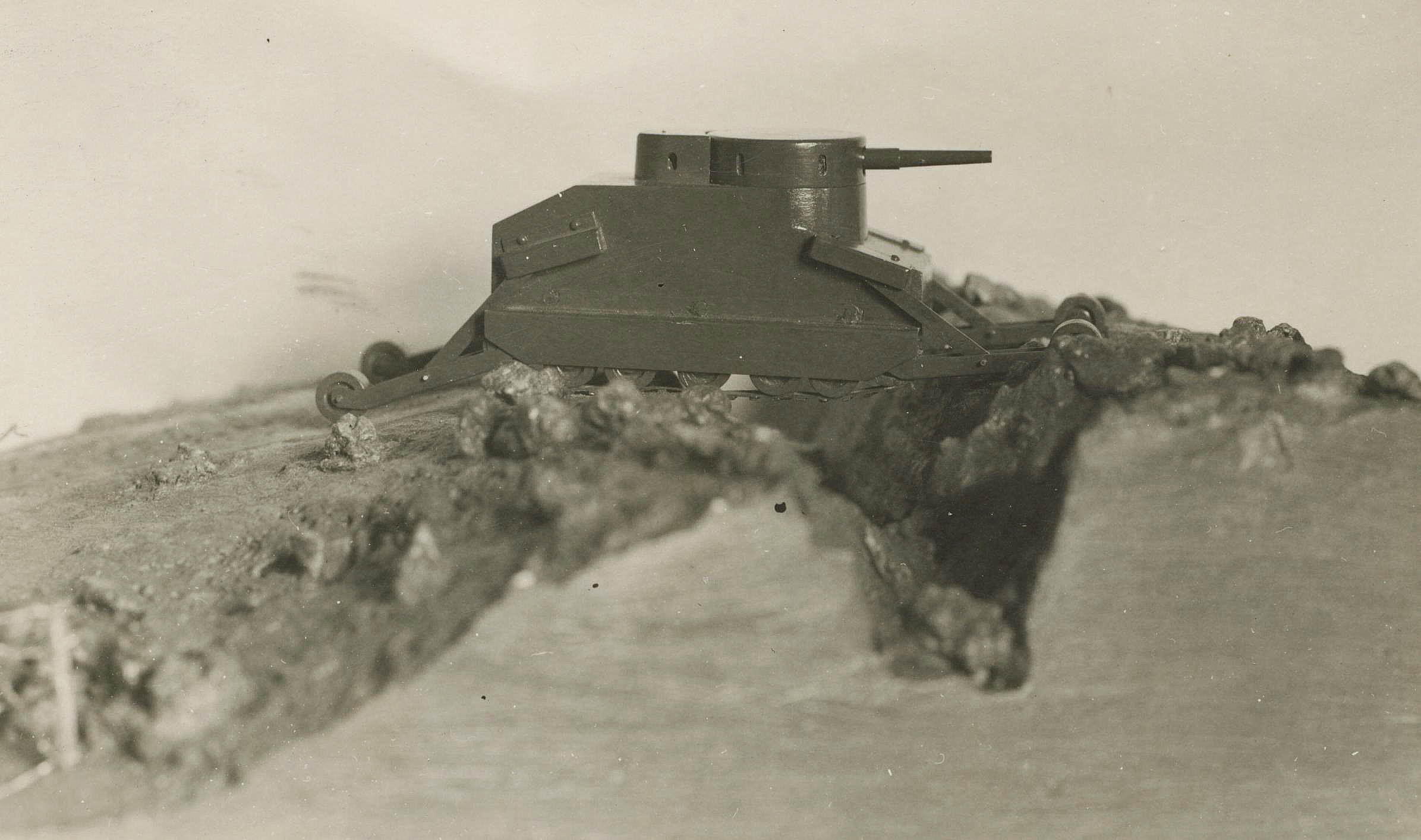 Burstyn-Panzer, Originalfoto aus den 1930ern von General v. Eimannsberger